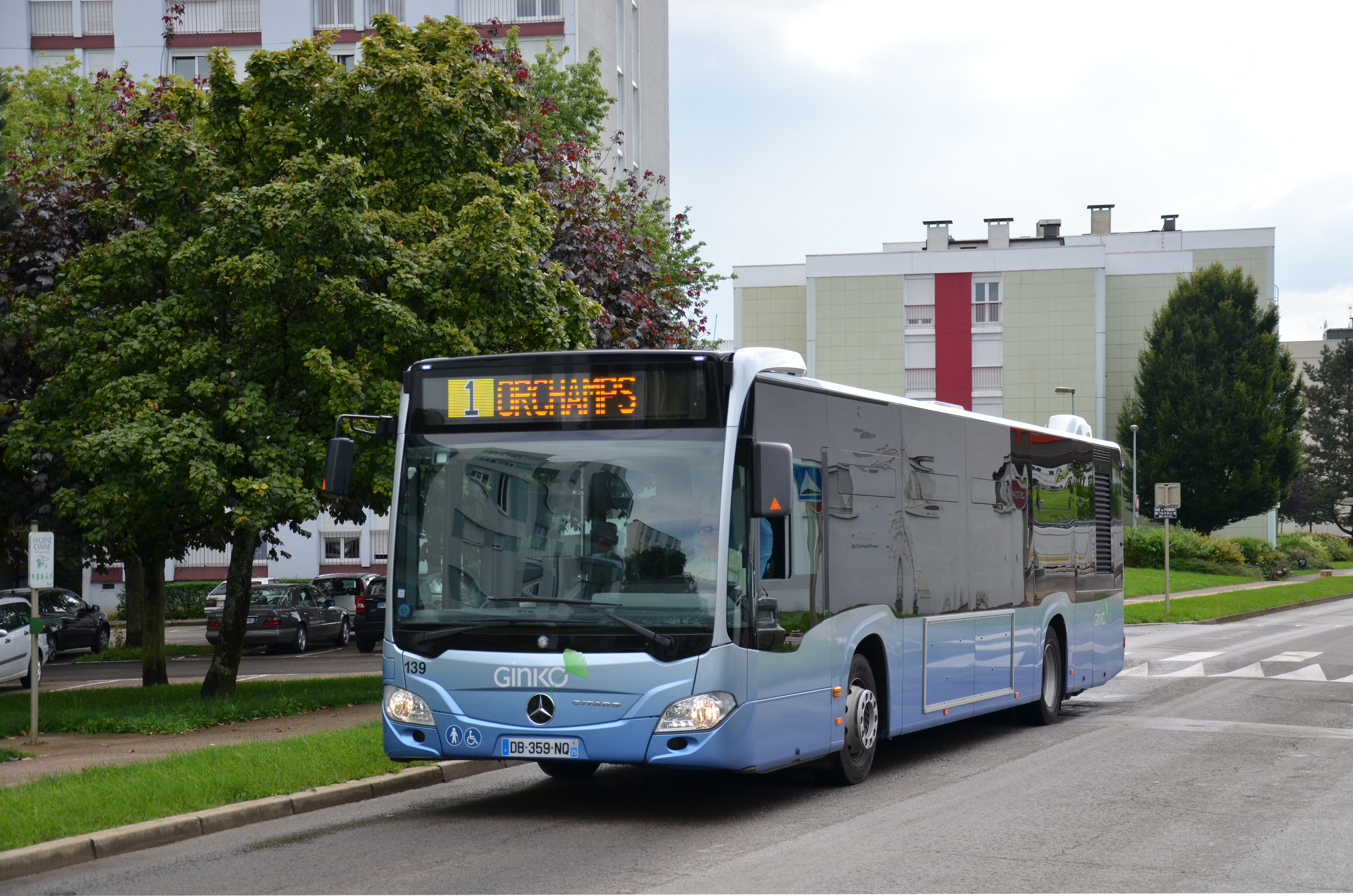 Mercedes Citaro C2 n°139 à Voltaire, sur le réseau Ginko de Besançon.